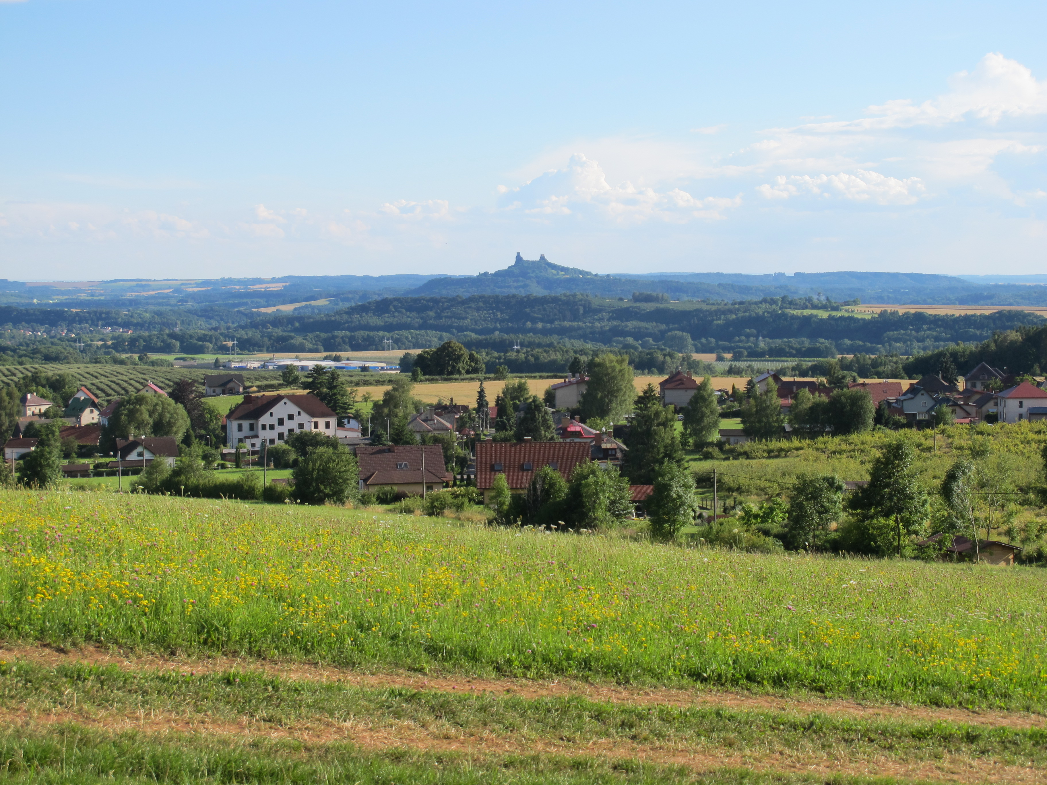 Tatobity - pohled na obec od sochy P. Marie